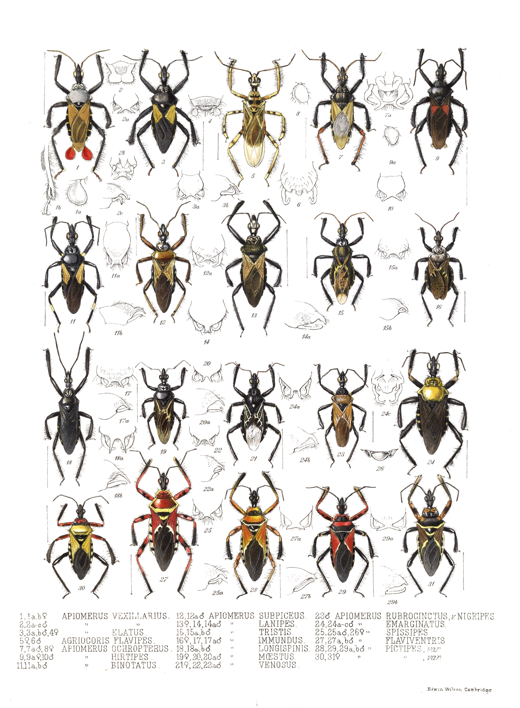 Apiomerus sp.